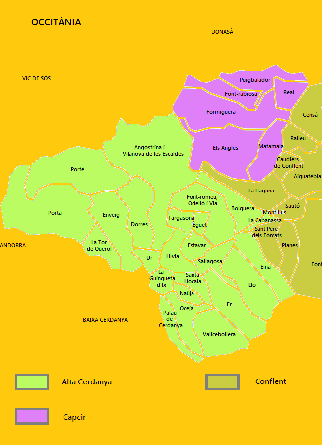 Mapa de l'Alta Cerdanya creat a partir d'un mapa de lliure disposició.